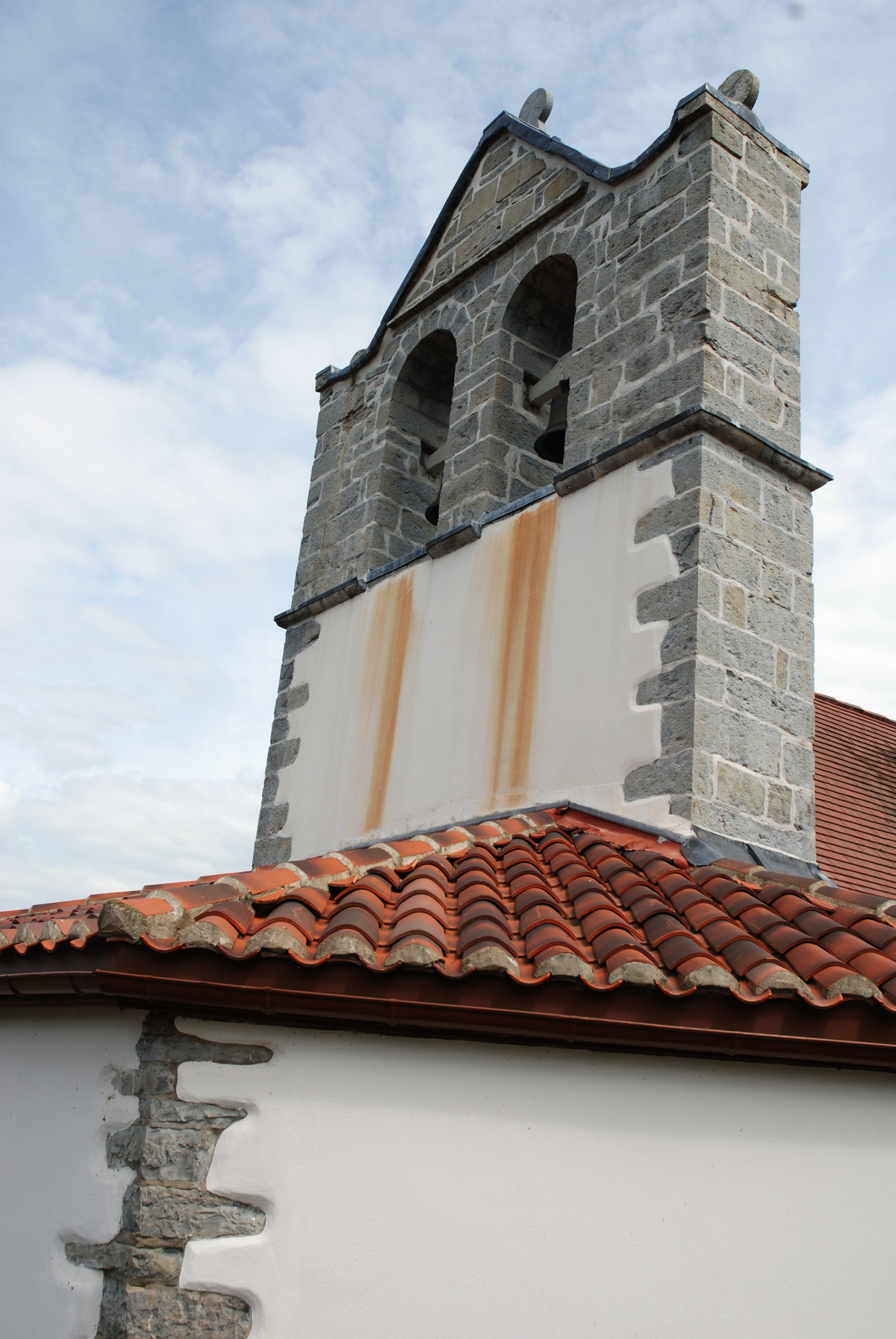 l'église Saint-Etienne à Arhansus